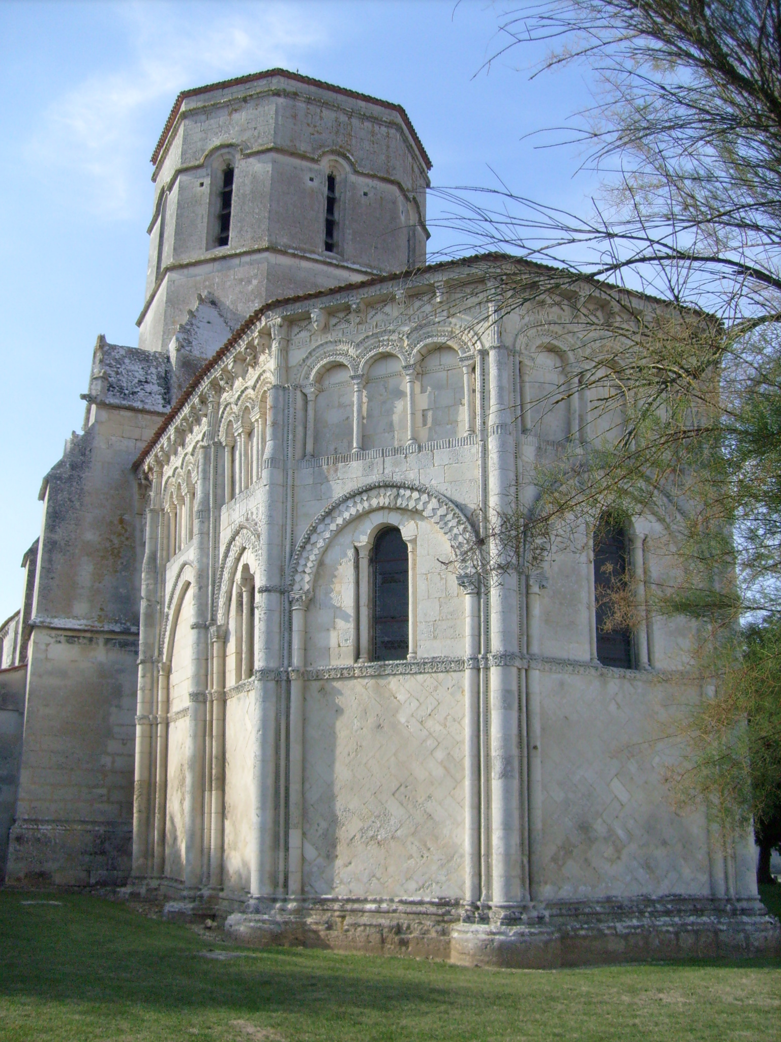 Eglise de Rétaud